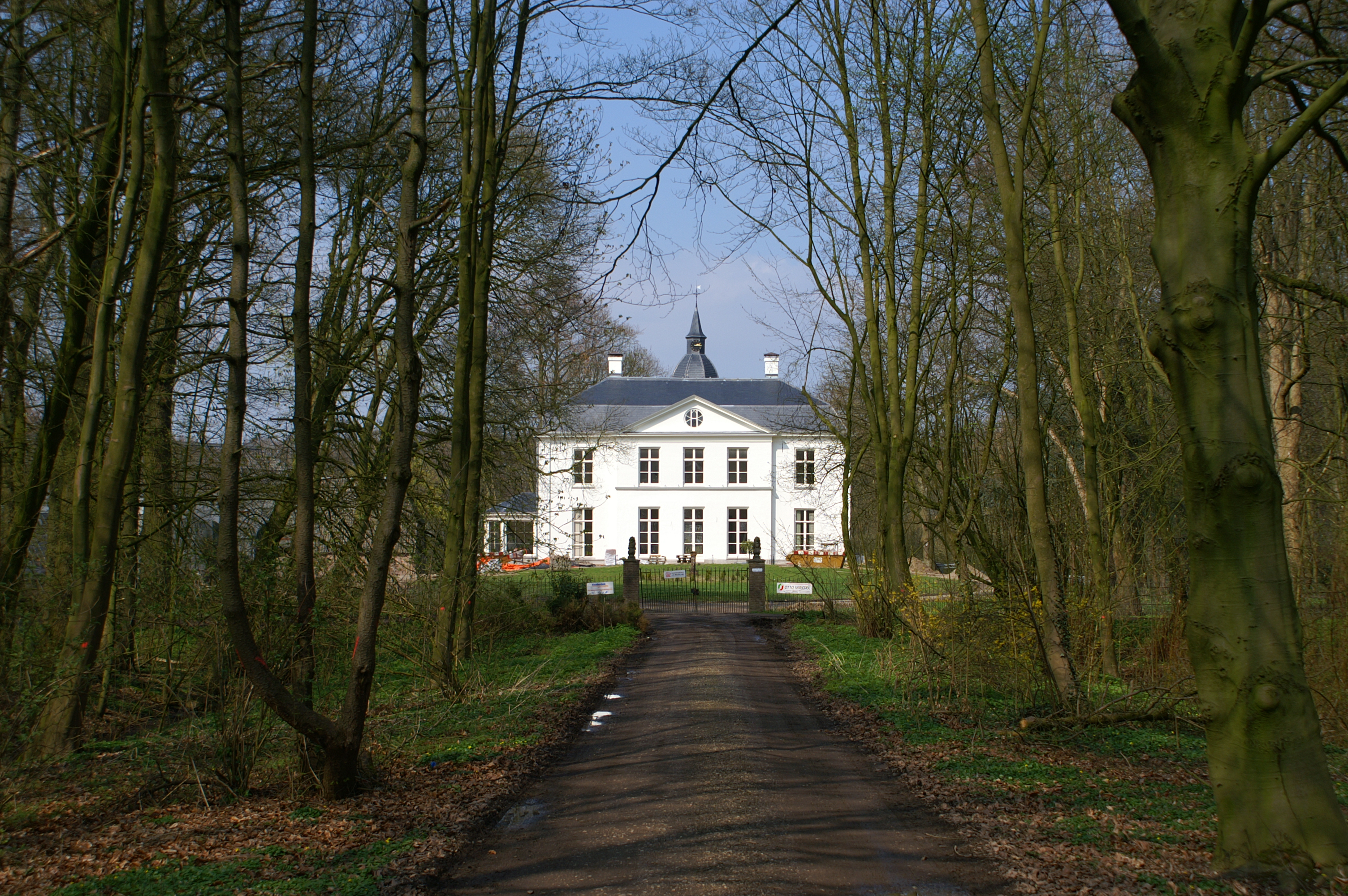 Het huis te Loenen of Loinen te Loenen.